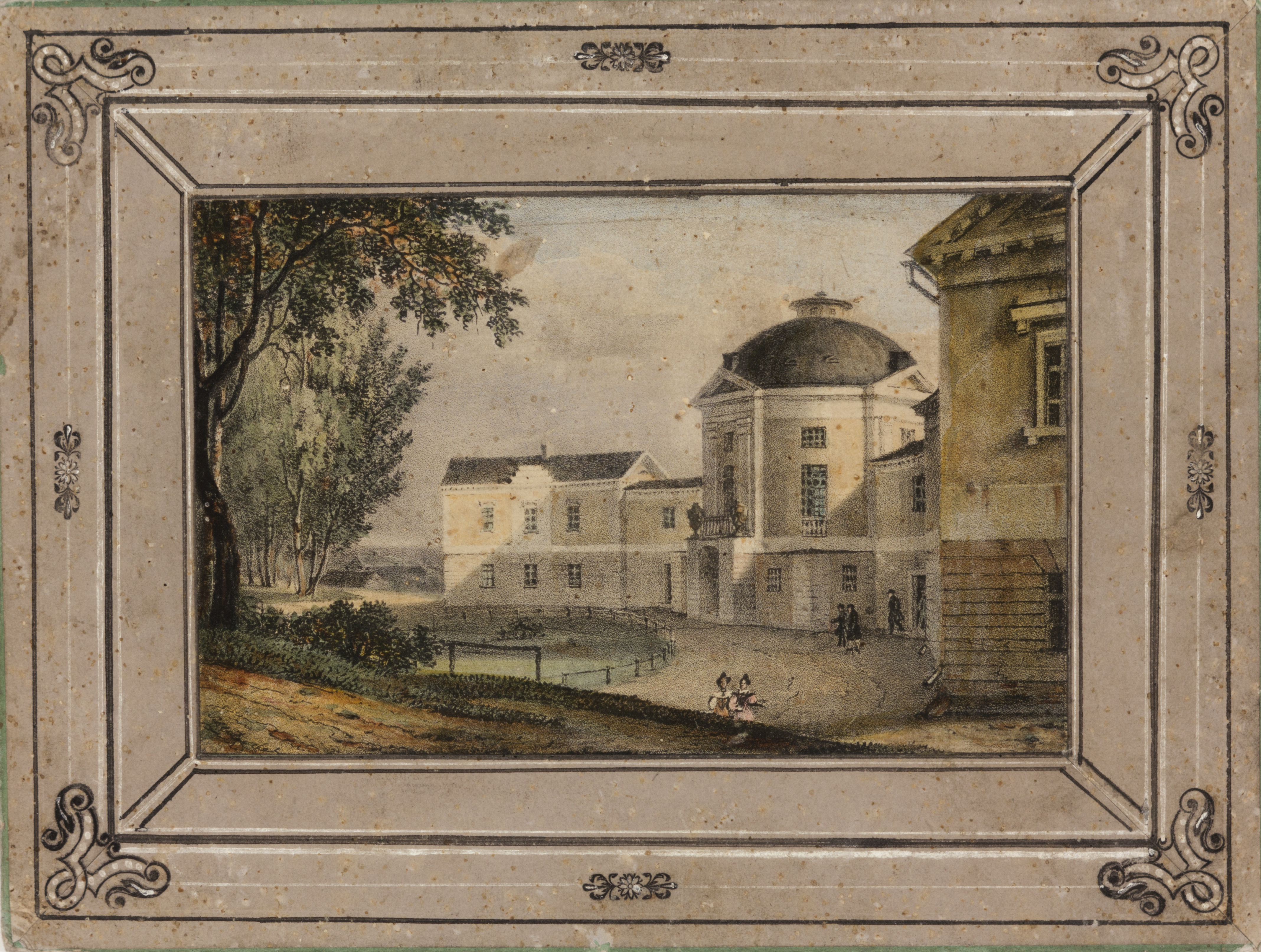 "Tartu anatoomikum". 1832–1835. Koloreeritud litograafia. MUIS:TKM TR 4019 G 1249 This image on crowdsourcing geotagging platform Ajapaik